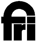 Försvarets rationaliseringsinstitut, logotype